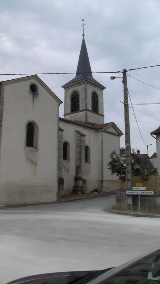 EGLISE DE BLAGNY SUR VINGEANNE --21